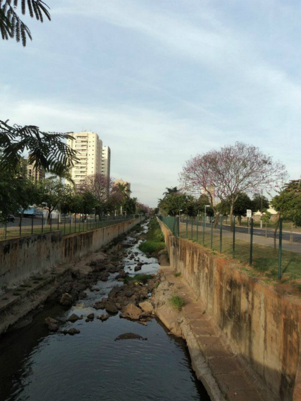 Avenida Pompeu de Toledo Araçatuba-SP